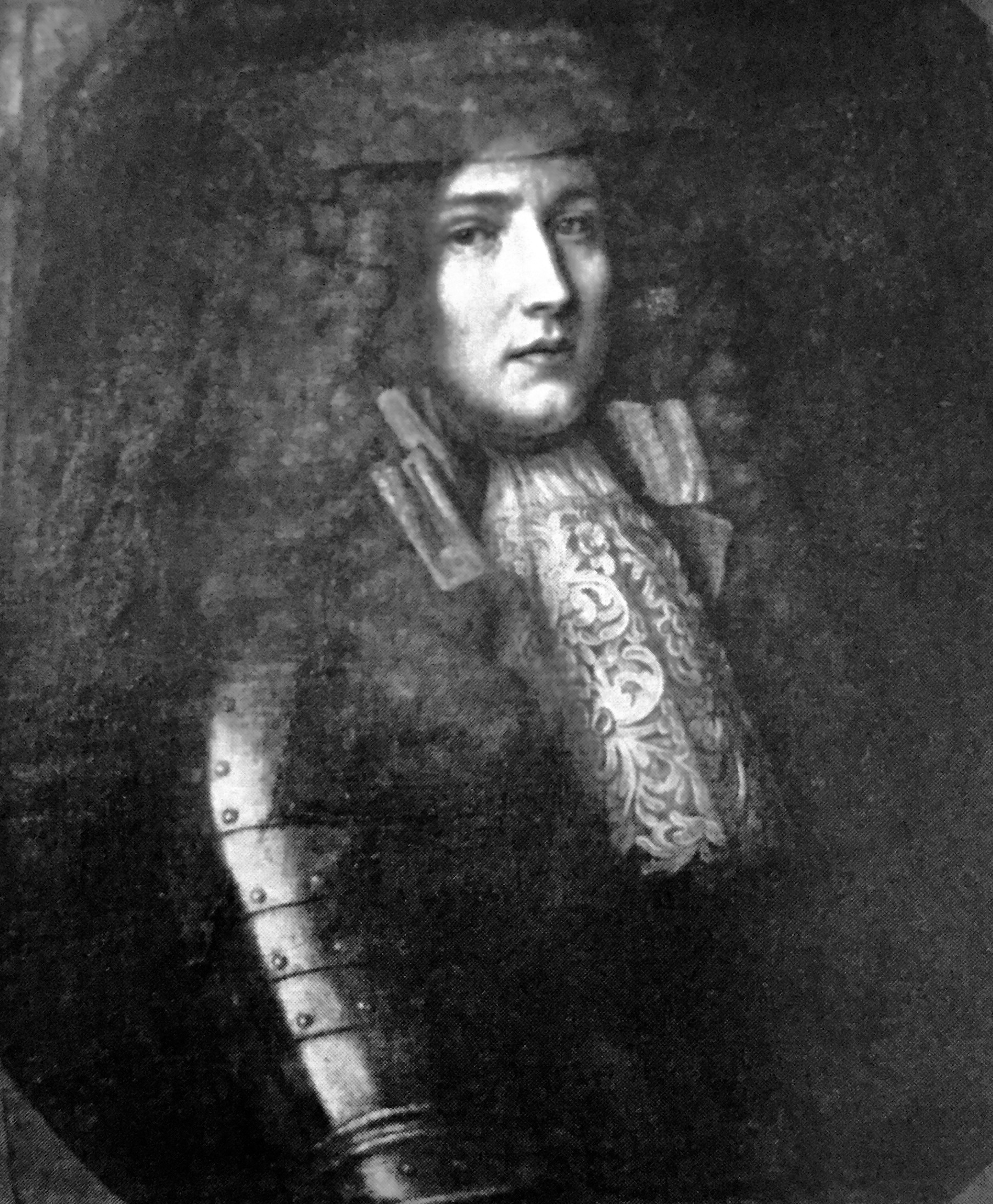 Ferdinand von Fürstemberg (1661-1718)